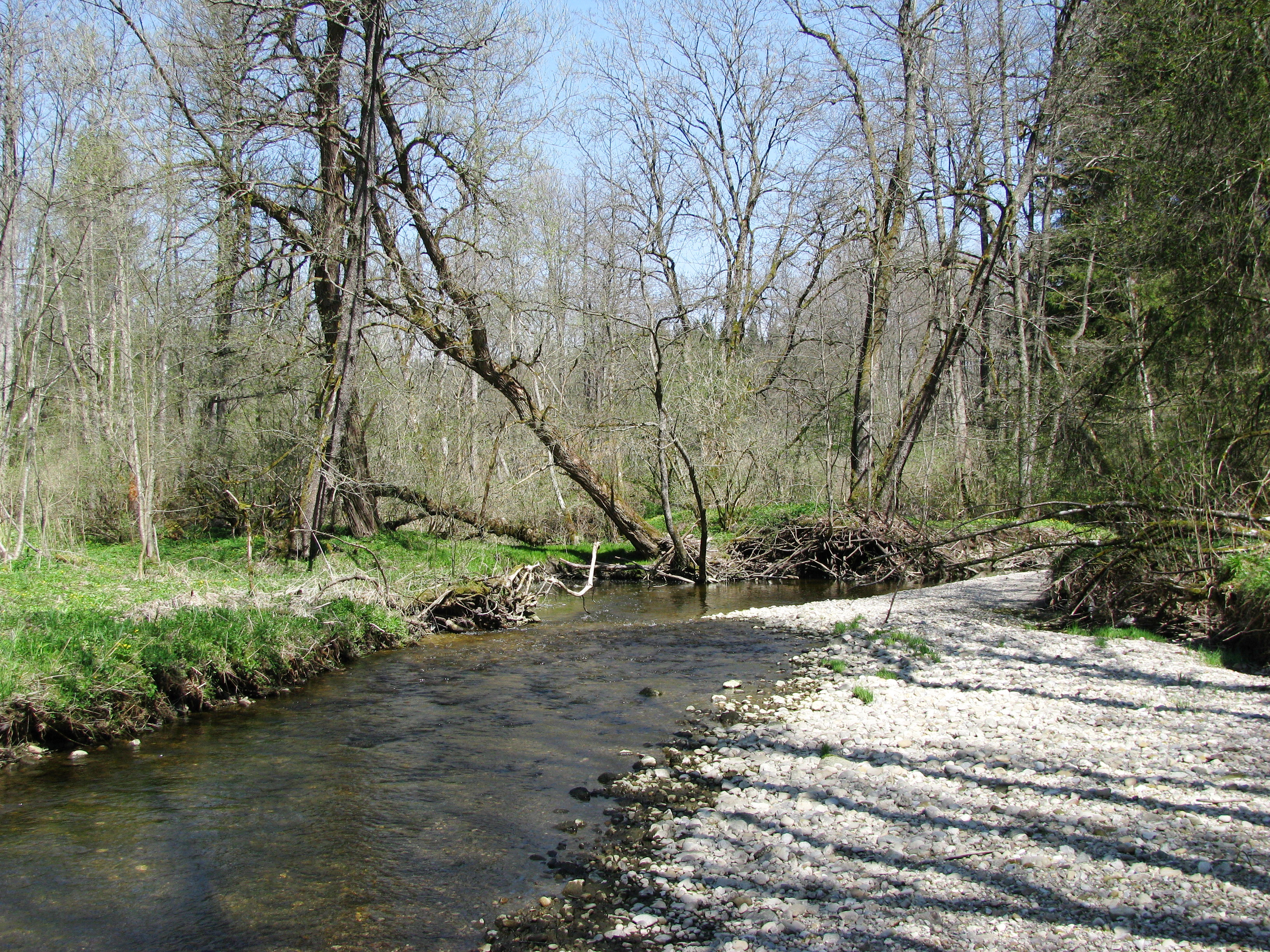 Die Windach zwischen Unterfinning und Windach ist Teil eines FFH-Gebietes und eines Landschaftsschutzgebietes